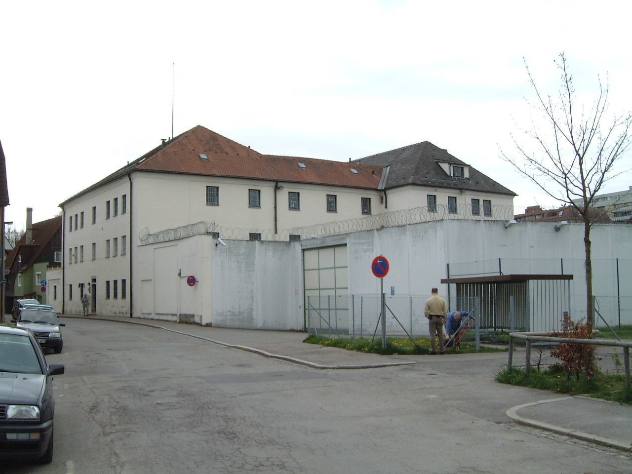 Ersetztes Gefängnis in Kempten, Weiherstr.